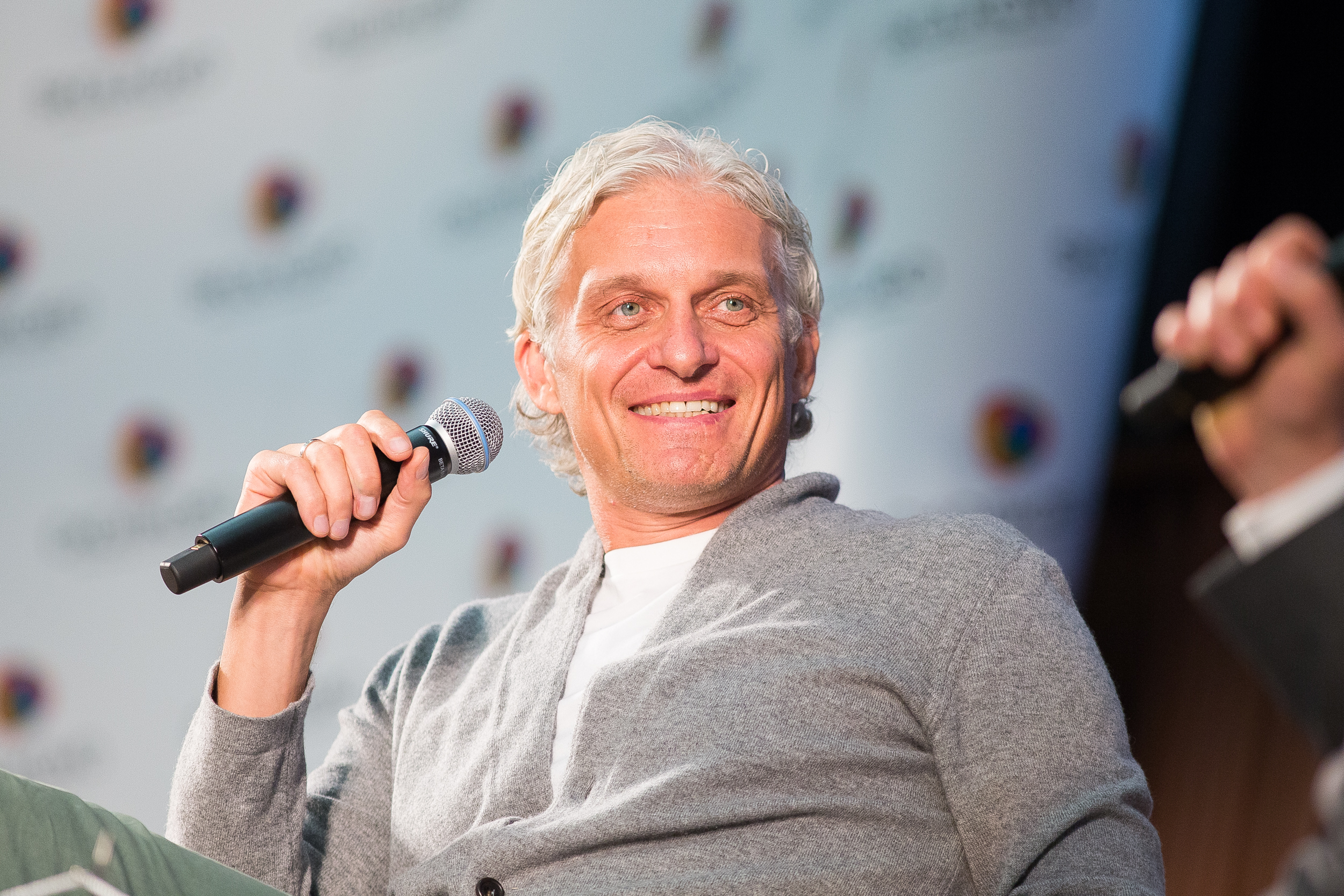 Предприниматель Олег Юрьевич Тиньков на встрече со студентами Московской школы управления «Сколково» на вечере «Speakers Night».